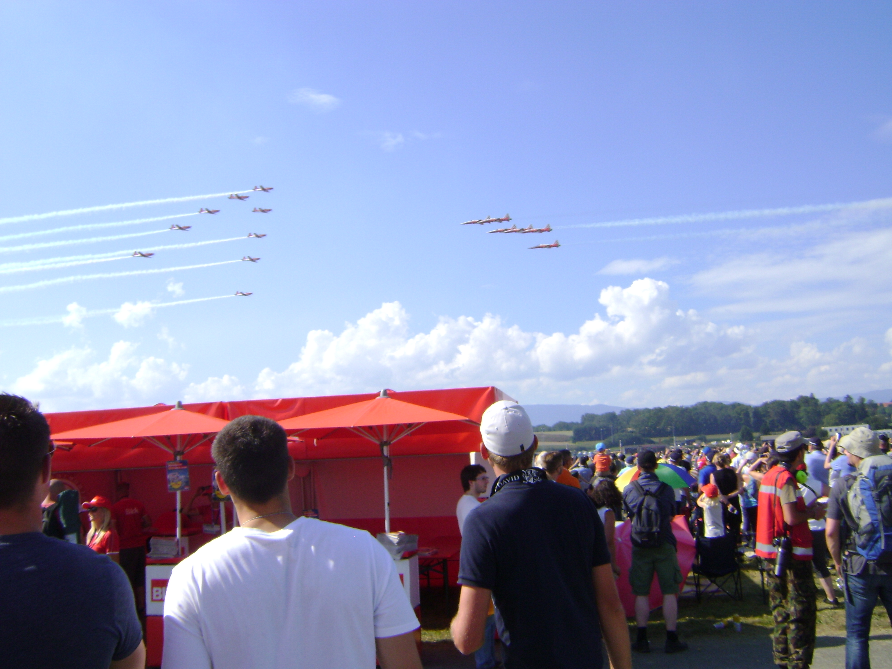 PS PC7 Tunnel